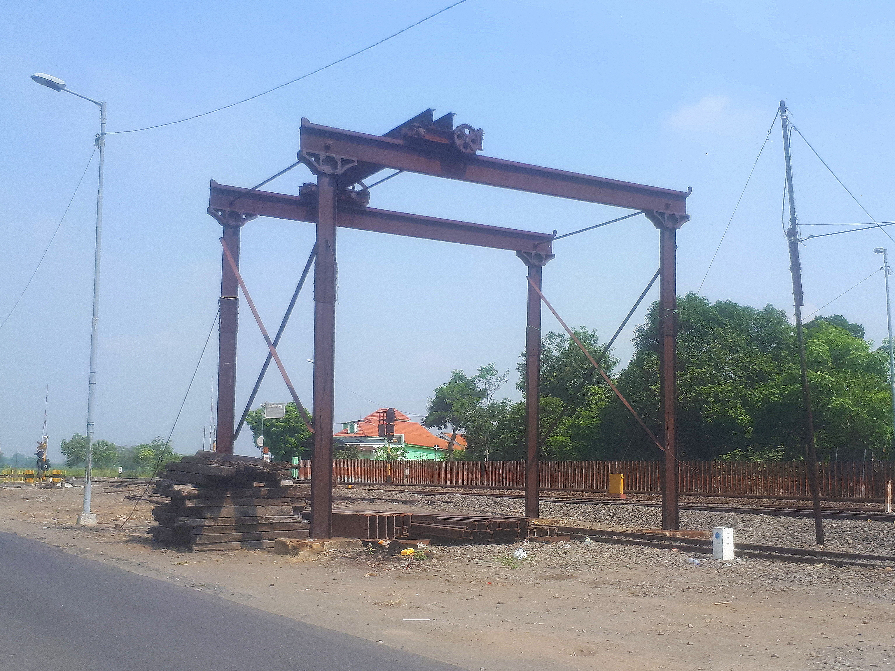 Alat pengangkut tebu yang terletak di barat daya Stasiun Kedinding, kini sudah tidak terpakai